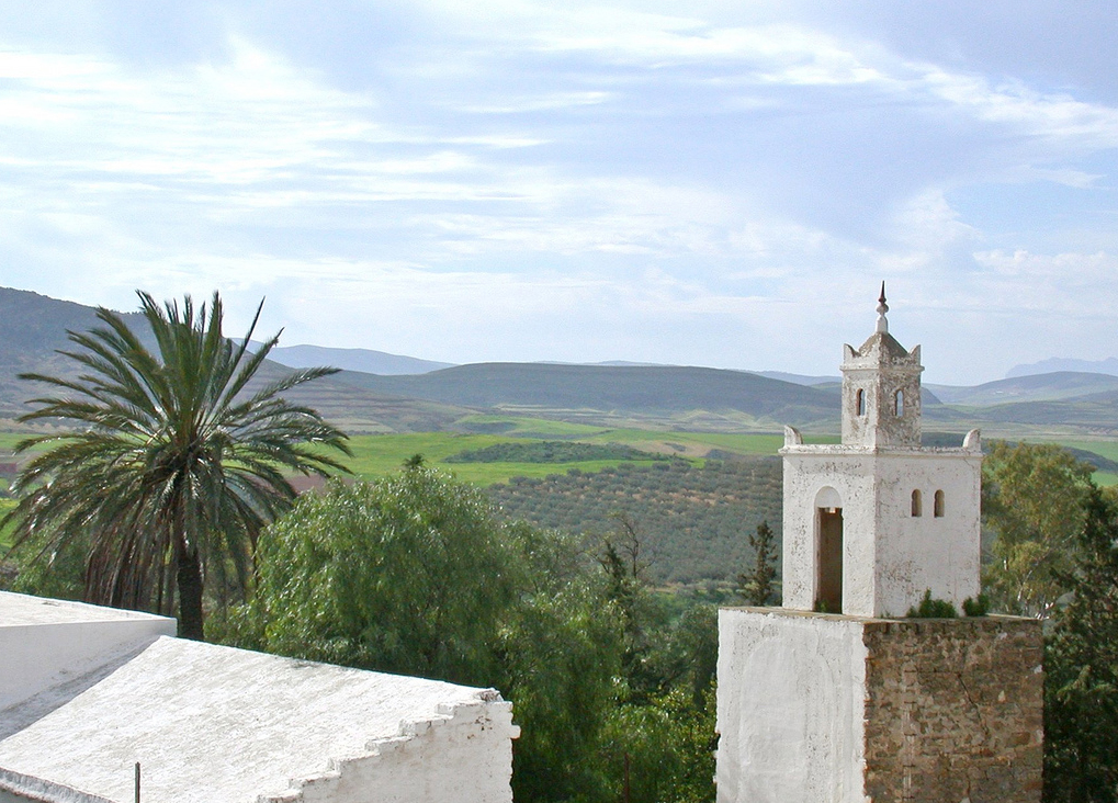 La plaine au nord de l'acropole romaine d'Oudhna en Tunisie